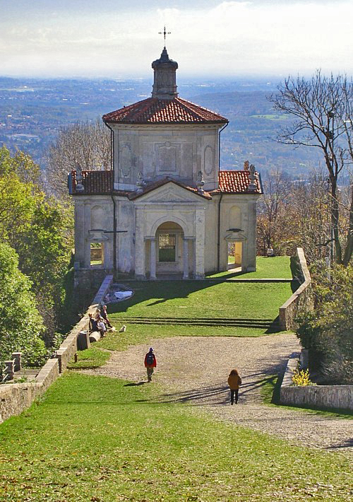 Caro monte.